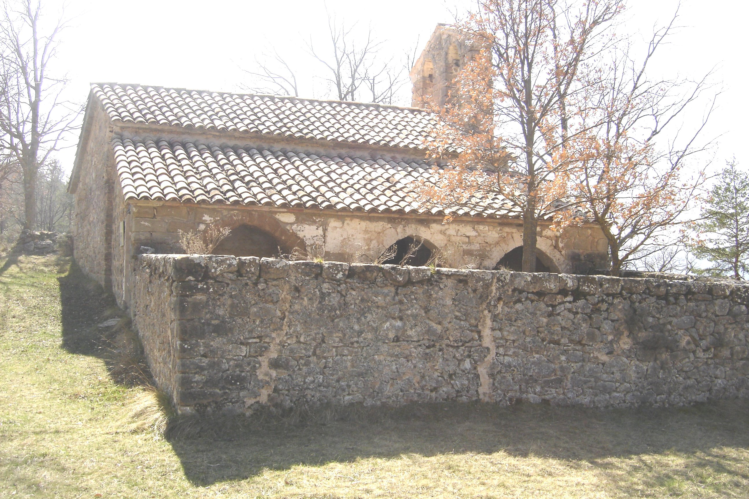 L'ermita de Sant Lleïr de Casabella, al municipi de La Coma i la Pedra, a la Vall de Lord (Solsonès) des del costat nord.